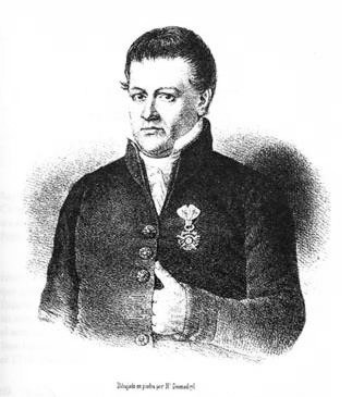 Es un retrato dibujado de Jose Gregorio Argomedo